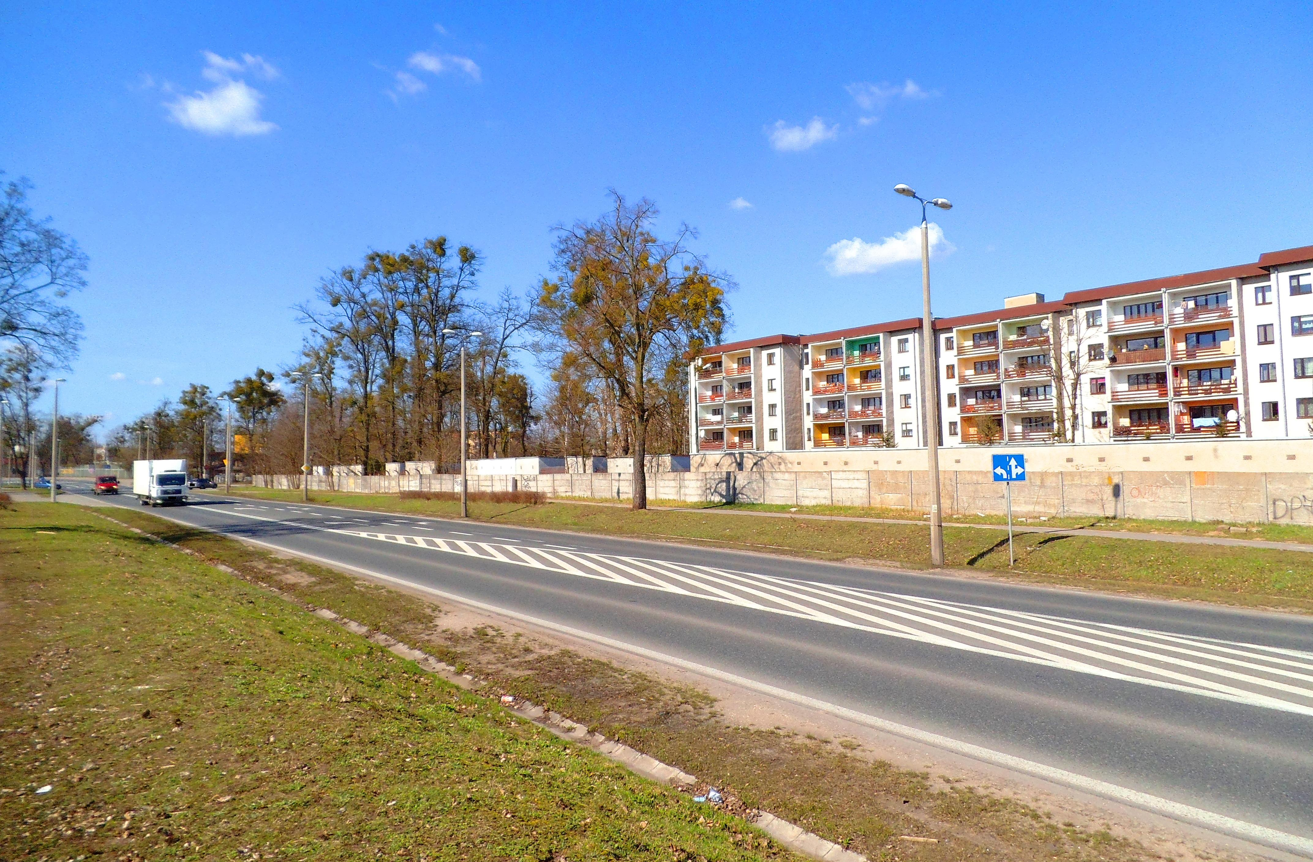 Trasa Średnicowa Podgórza w Toruniu2